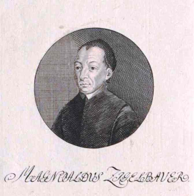 Magnoald Ziegelbauer (1689–1750)